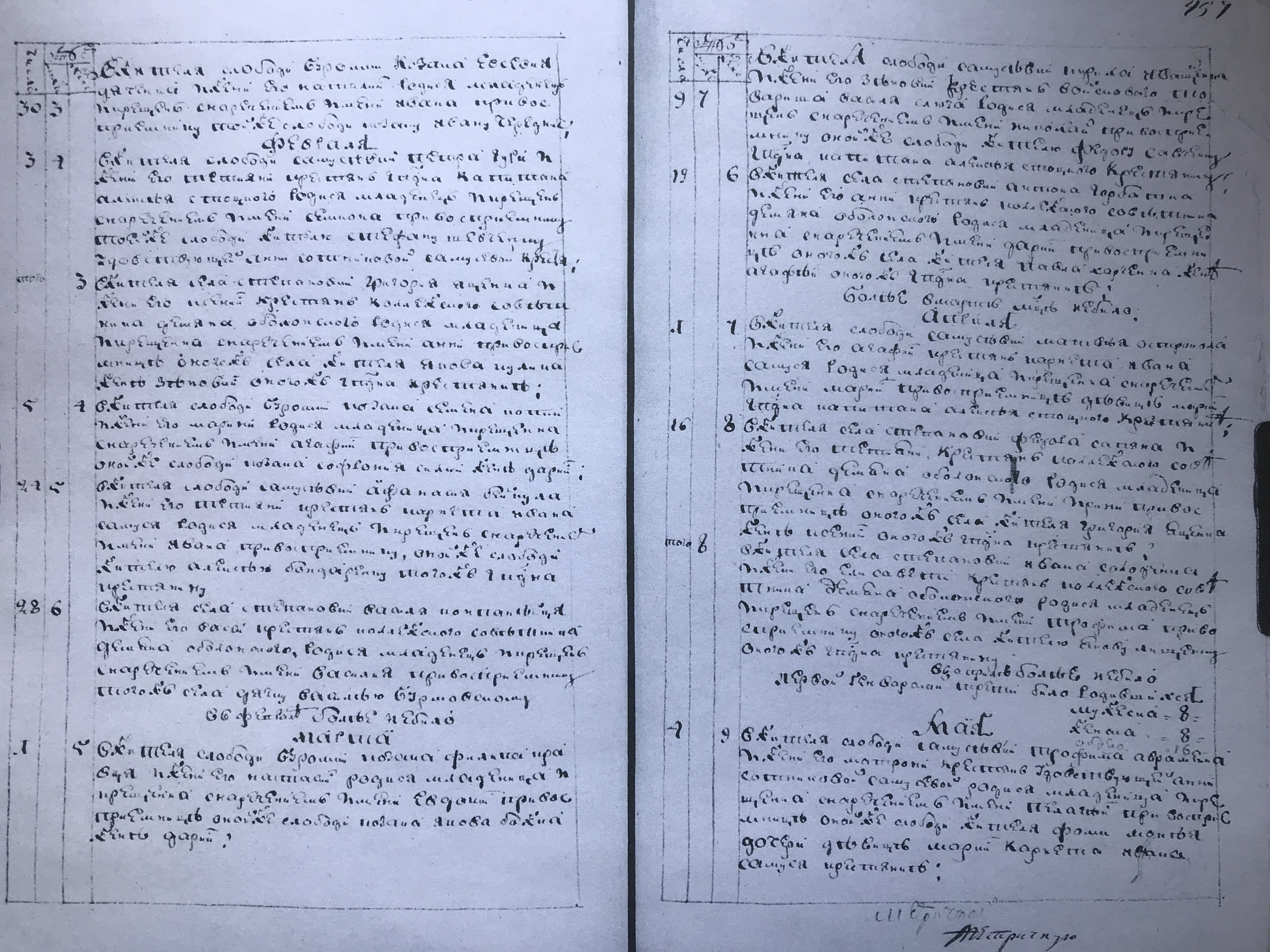 Записи про народження місцевих жителів за 1796 рік